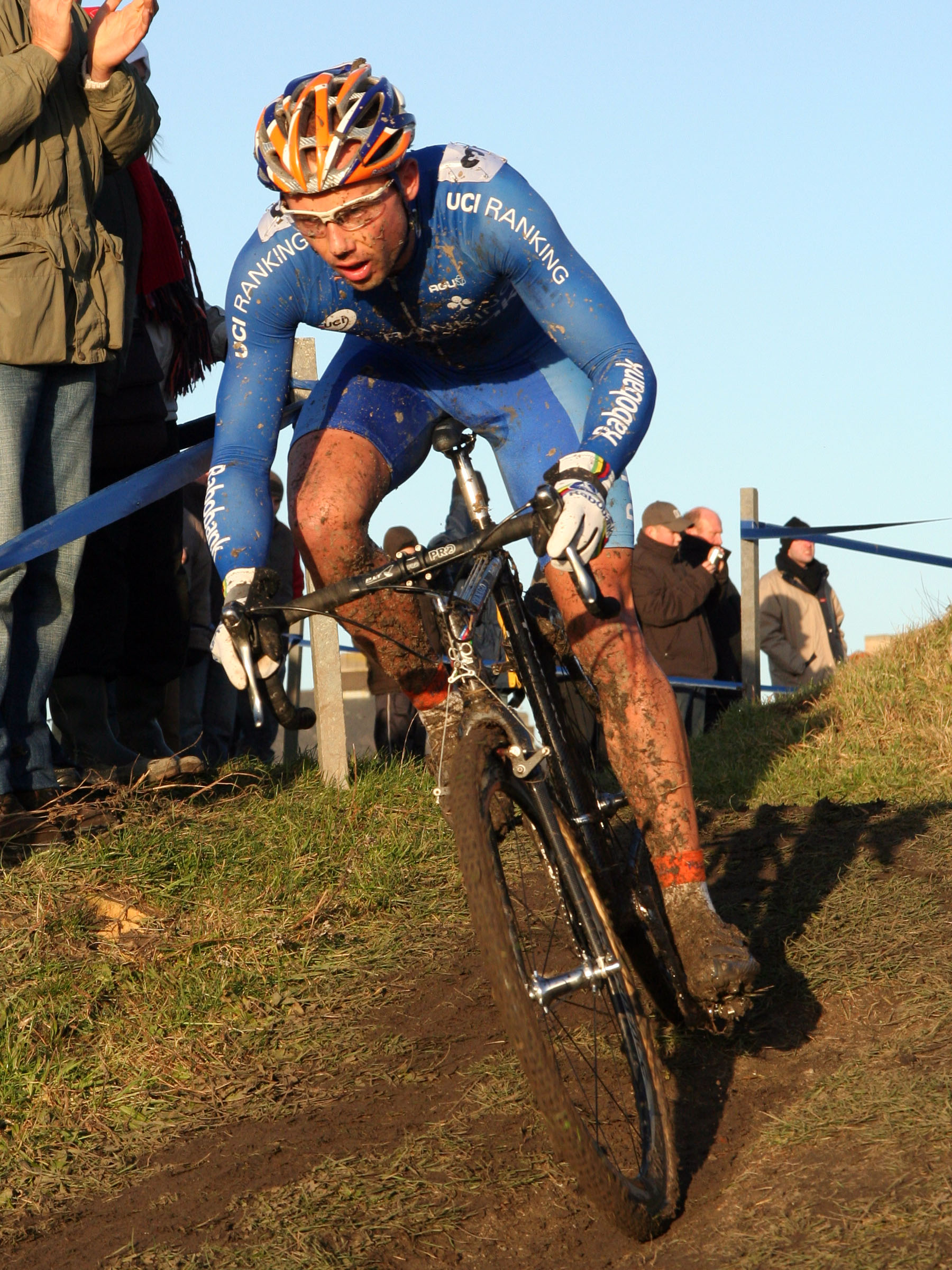 Sven Nys tijdens de Noordzeecross 2007 in Middelkerke